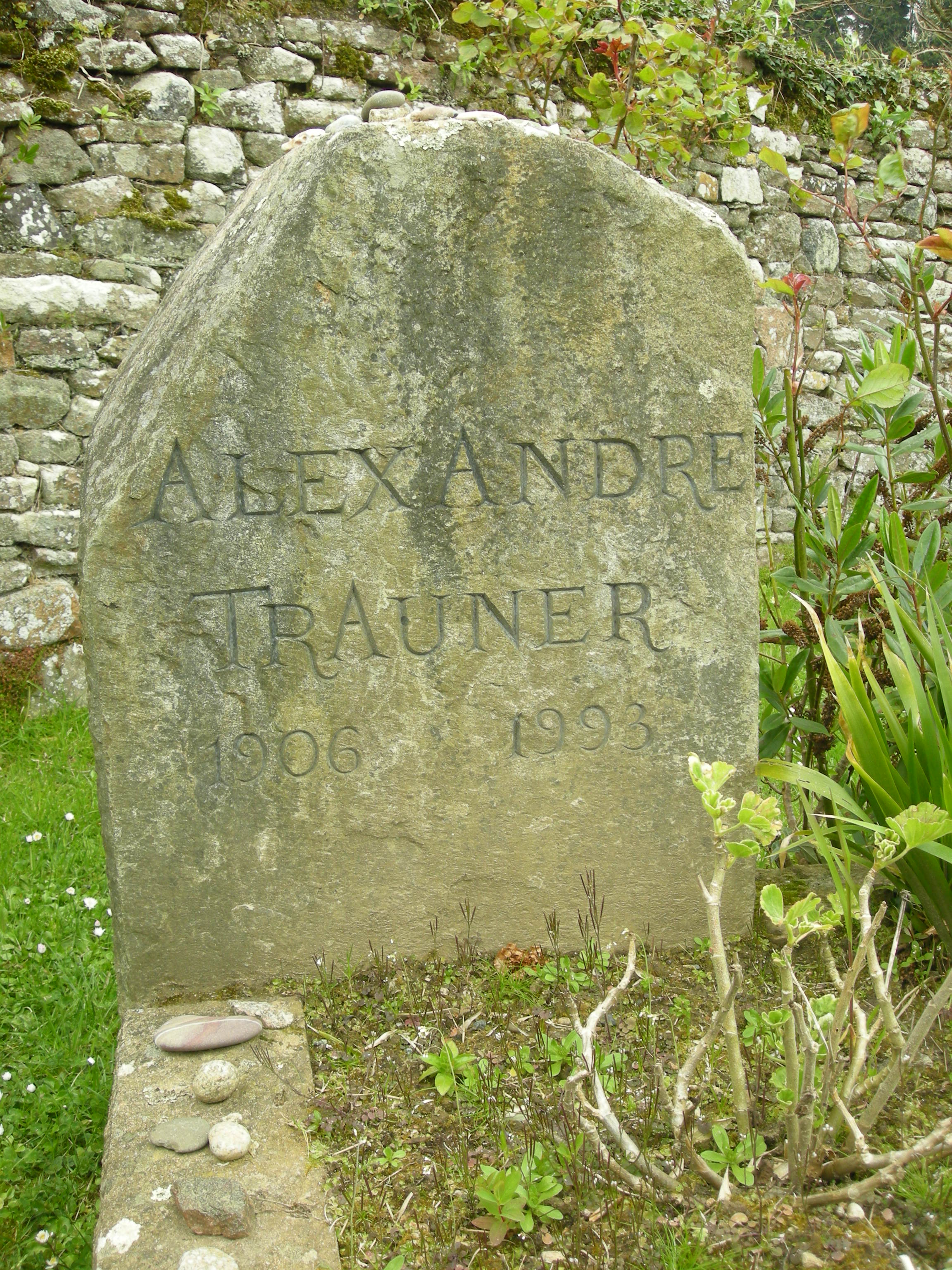 La tombe du décorateur Alexandre Trauner, non loin de celle de Jacques Prévert au cimetière d'Omonville-la-Petite (Normandie).